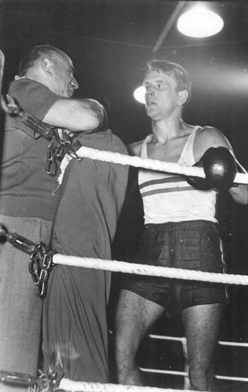 Pionkowski Zentralbild TBD 6.10.1953 Internationaler Vergleichskampf SV Gwardia Polen-SV Dynamo Berlin. In deinem Internatiionalen Box-Vergleichskampf standen sich SV Gwardia Polen und SV Dynamo Berlin am 30.9.1953 in der Thüringerhalle in Erfurt gegenüber. Die Boxer der SV Dynamo konnten ihre Niederlage von 15:7 in Berlin wiedergutmachen und schlugen die Vertreter von Polen mit 11:9. UBz: Der 24-jährige Meister des Sportes Piórkowski. Er errang bei den Weltfestspielen 1955 die Gold-Medaille und war polnischer Repräsentant bei den Europa-Meisterschaften 1955, mit dem Cheftrainer der polnischen Mannschaft.